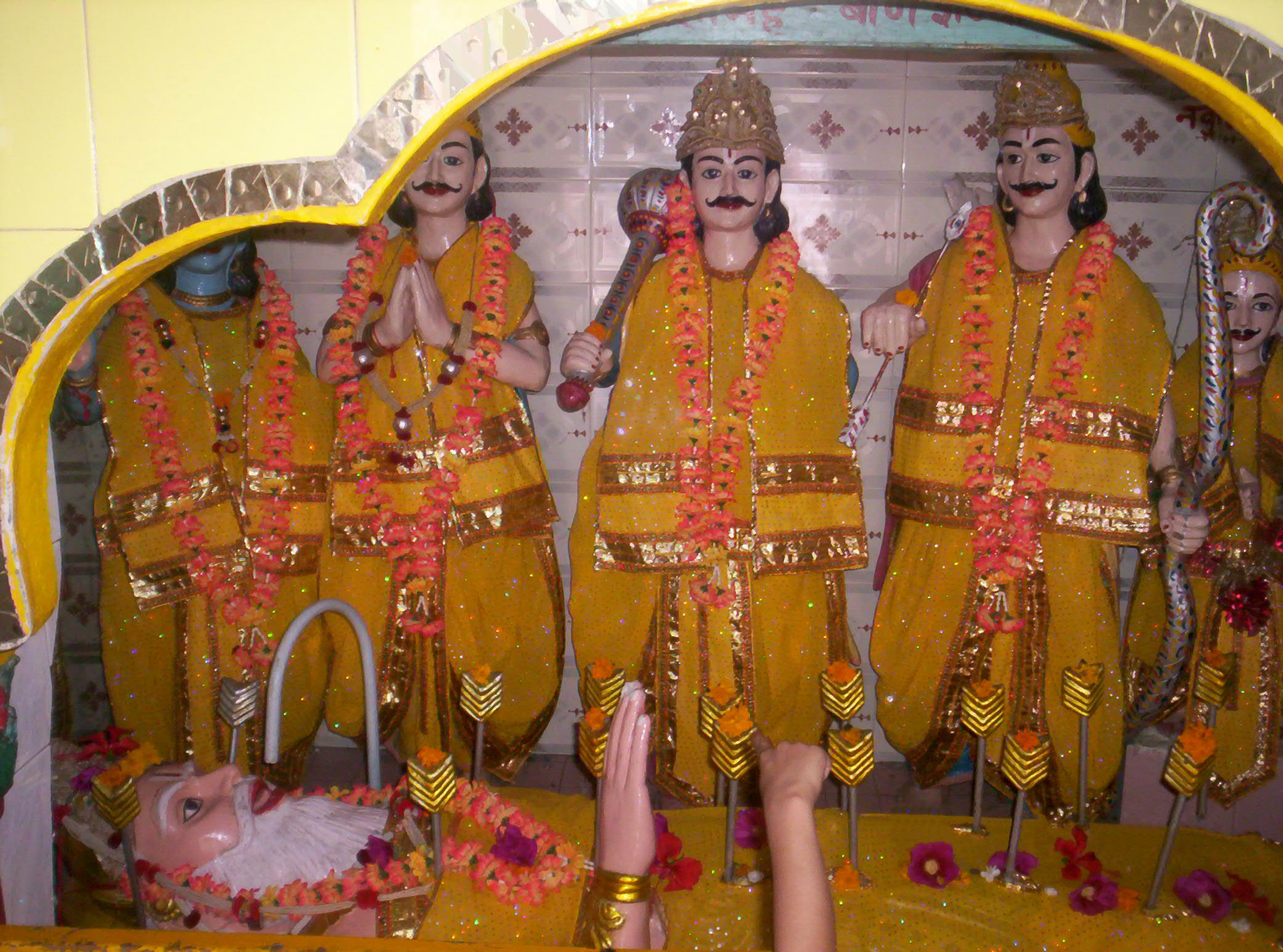 Bhisma Kund, Kurukshetra, Haryana, India